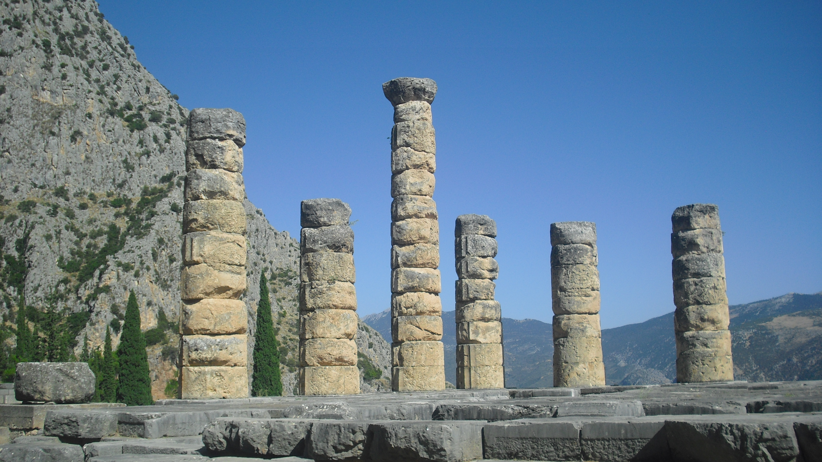 Der Apollontempel in Delphi, Griechenland